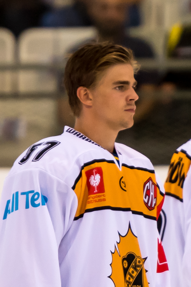 Champions Hockey League - Vienna Capitals vs Skelleftea AIK am 18.08.2016. Bild zeigt Emil Djuse (Skelleftea AIK).